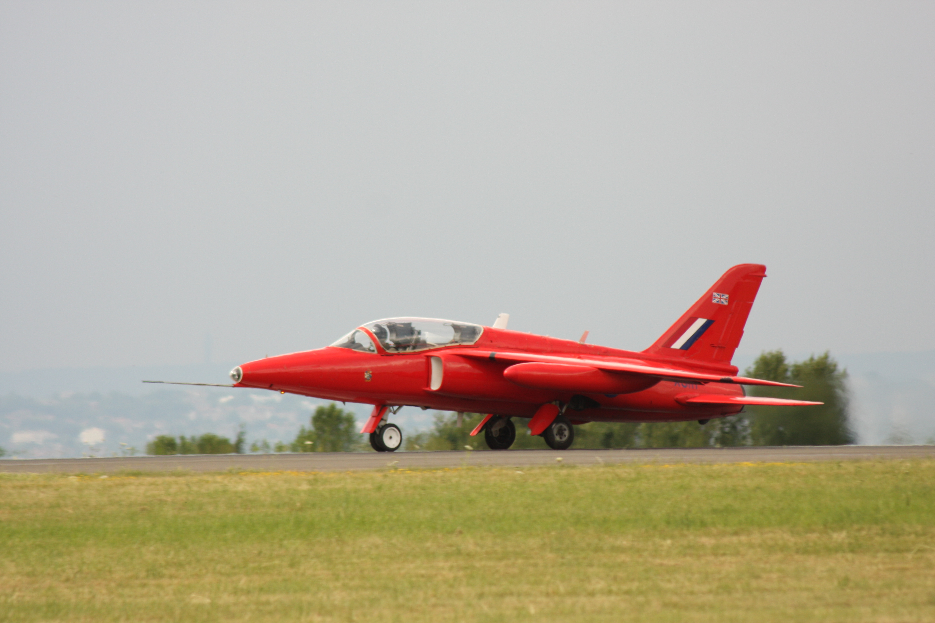 Biggin Hill 2009